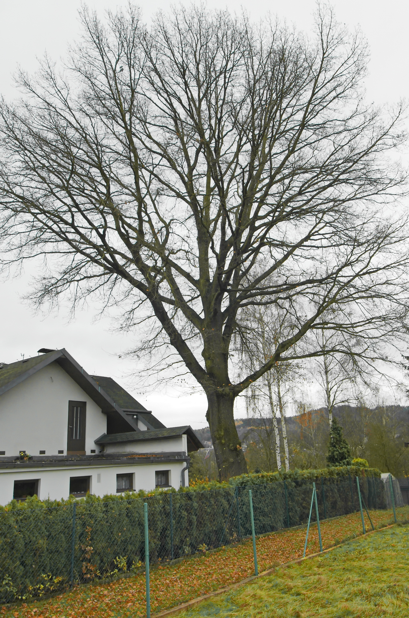 památný strom - Žalman - Tašovice (místní část Karlových Varů), okres Karlovy Vary